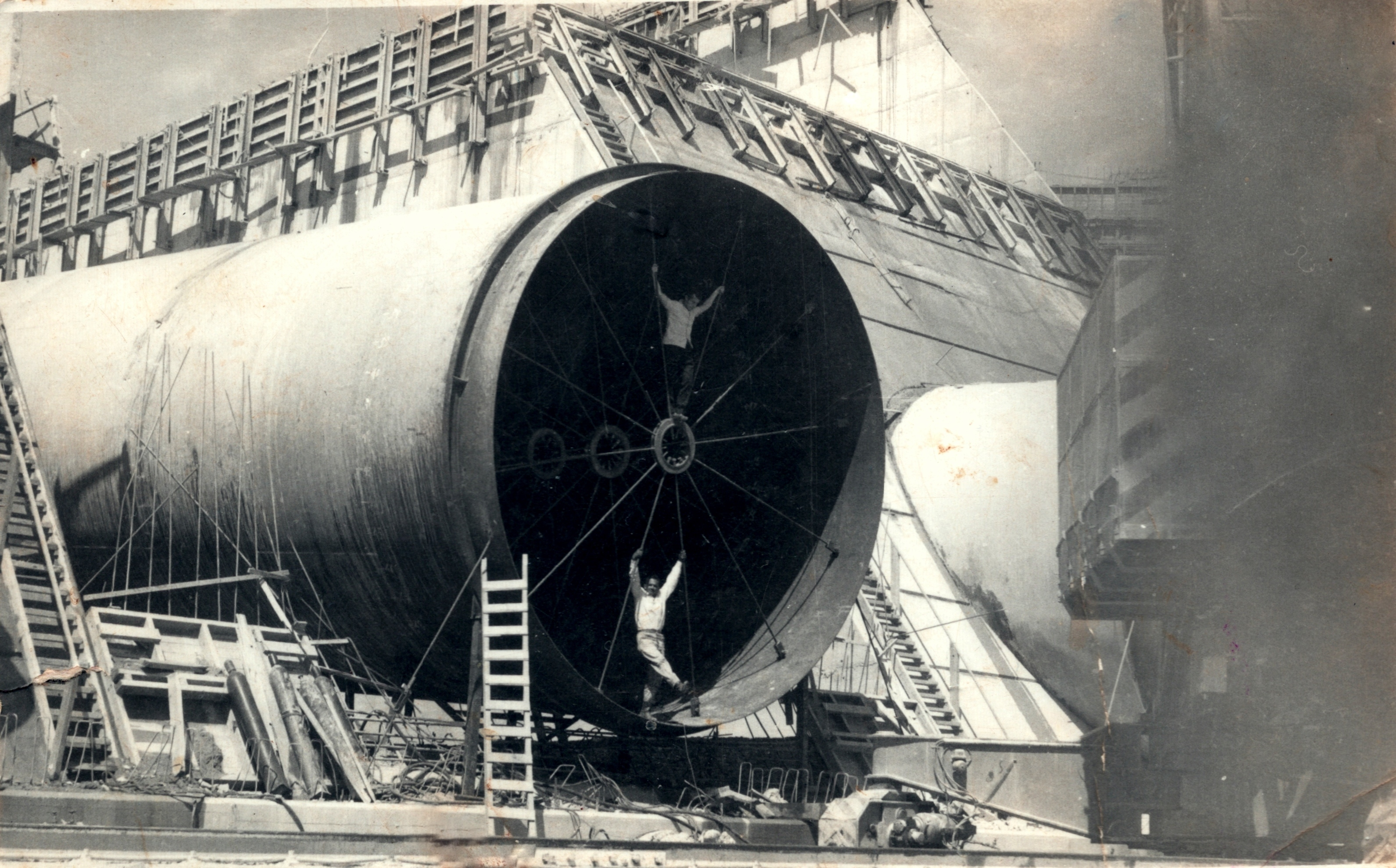 Construção dos tubos para conduzir a água às turbinas.